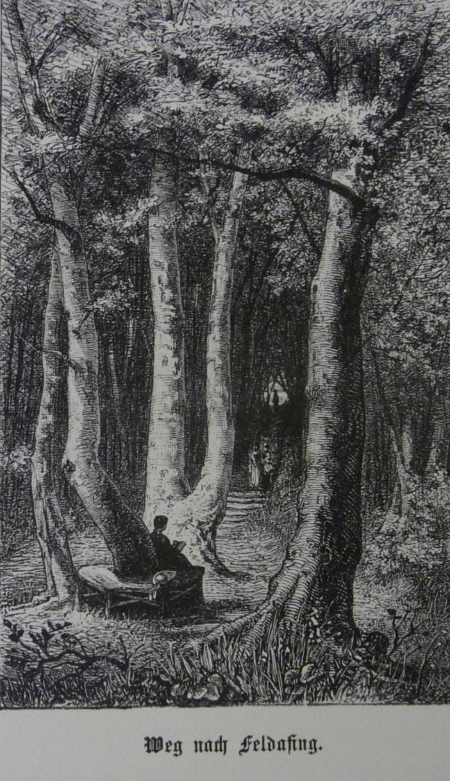 In seinem 1876 erschienenen Buch "Der Starnberger See: eine Wanderung durch seine Uferorte" zeigt G. A. Horst auch eine idyllische Waldpromenade mit Rundbank zwischen Schloss Possenhofen und Feldafing.